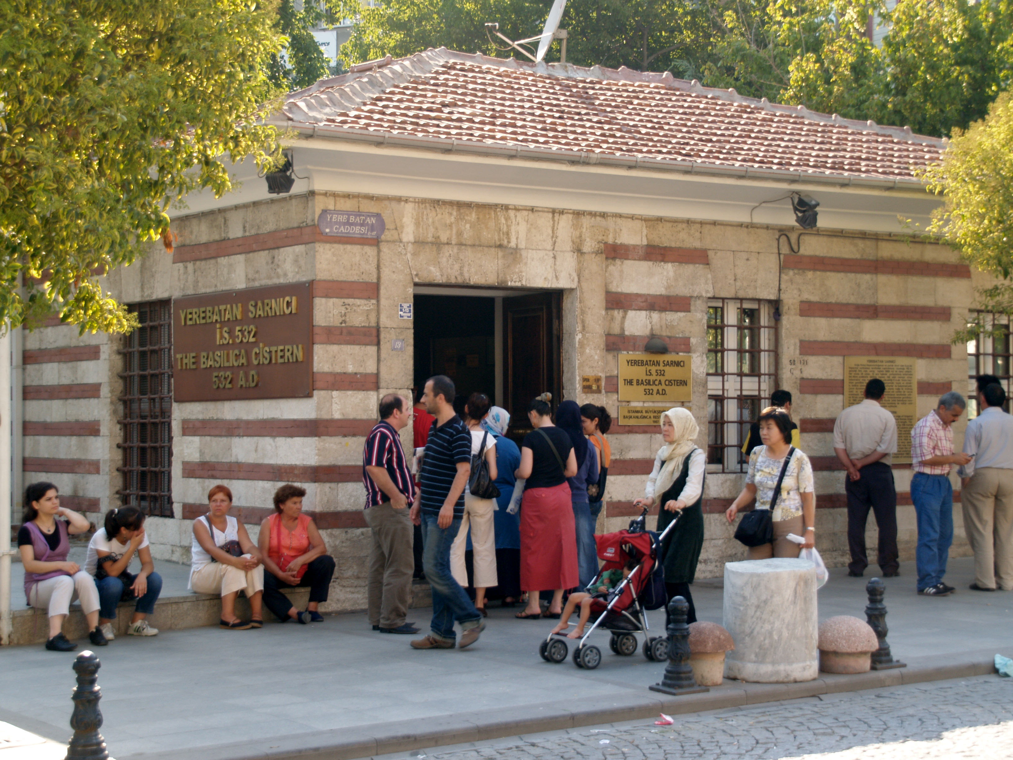 Turkey, Istanbul, Basilica Cistern (Yerebatan Sarayi)